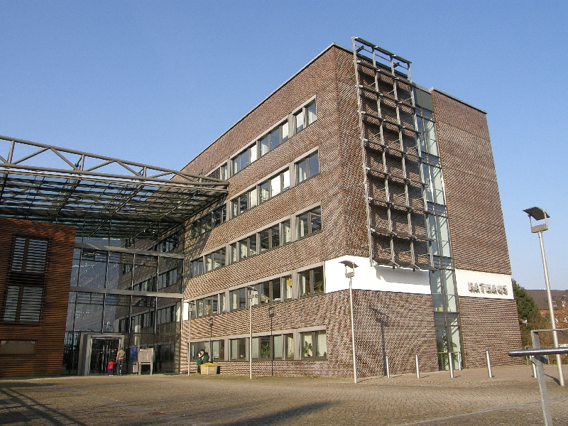 Bilder aus Garbsen